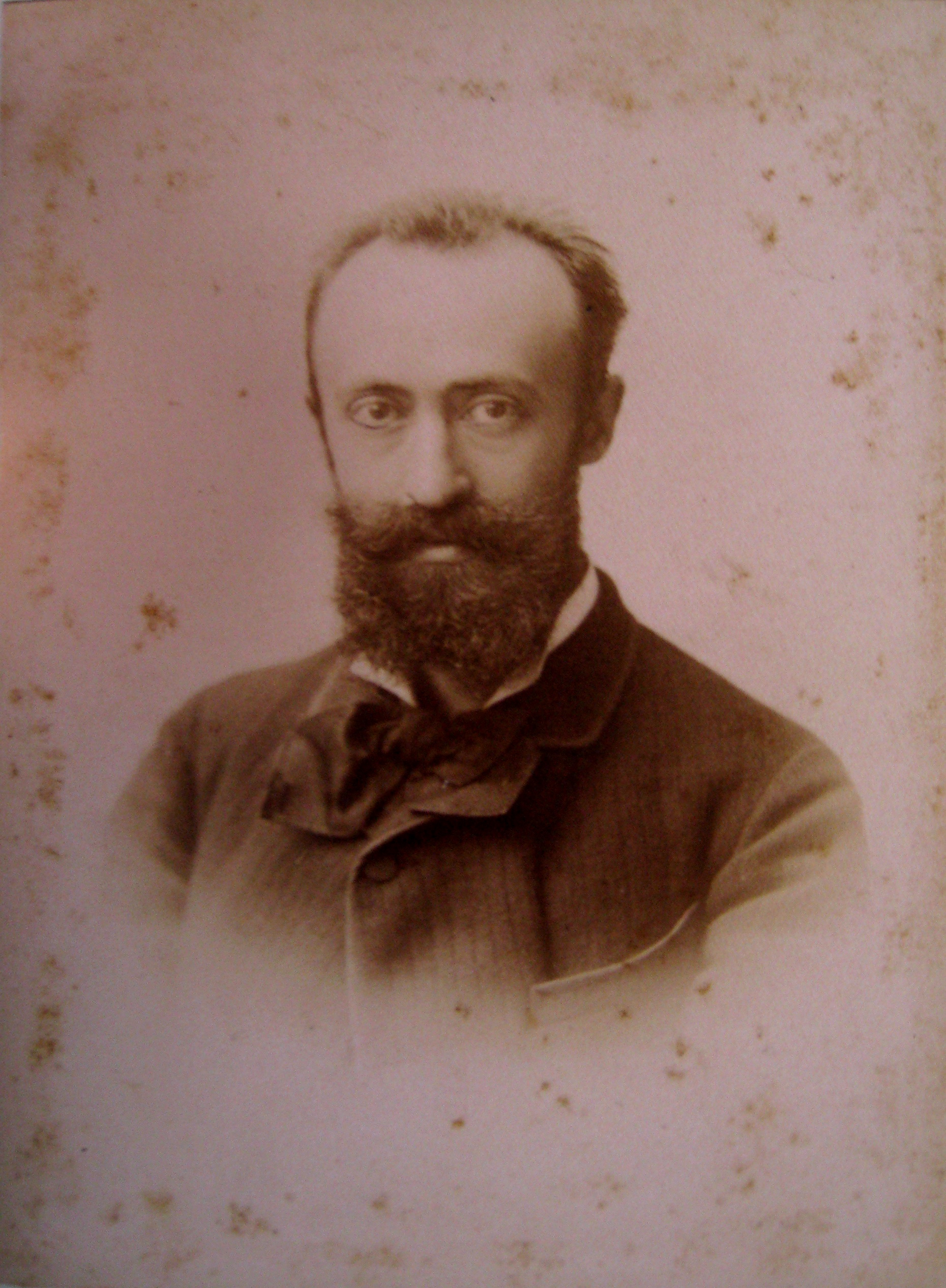 Retrat d'Apel·les Mestres (Barcelona, 1854-1936), artista polifacètic dedicat al dibuix, poesia, autor de teatre, música, il·lustració gràfica. Obra dels Fotògrafs Napoleon de 1884.